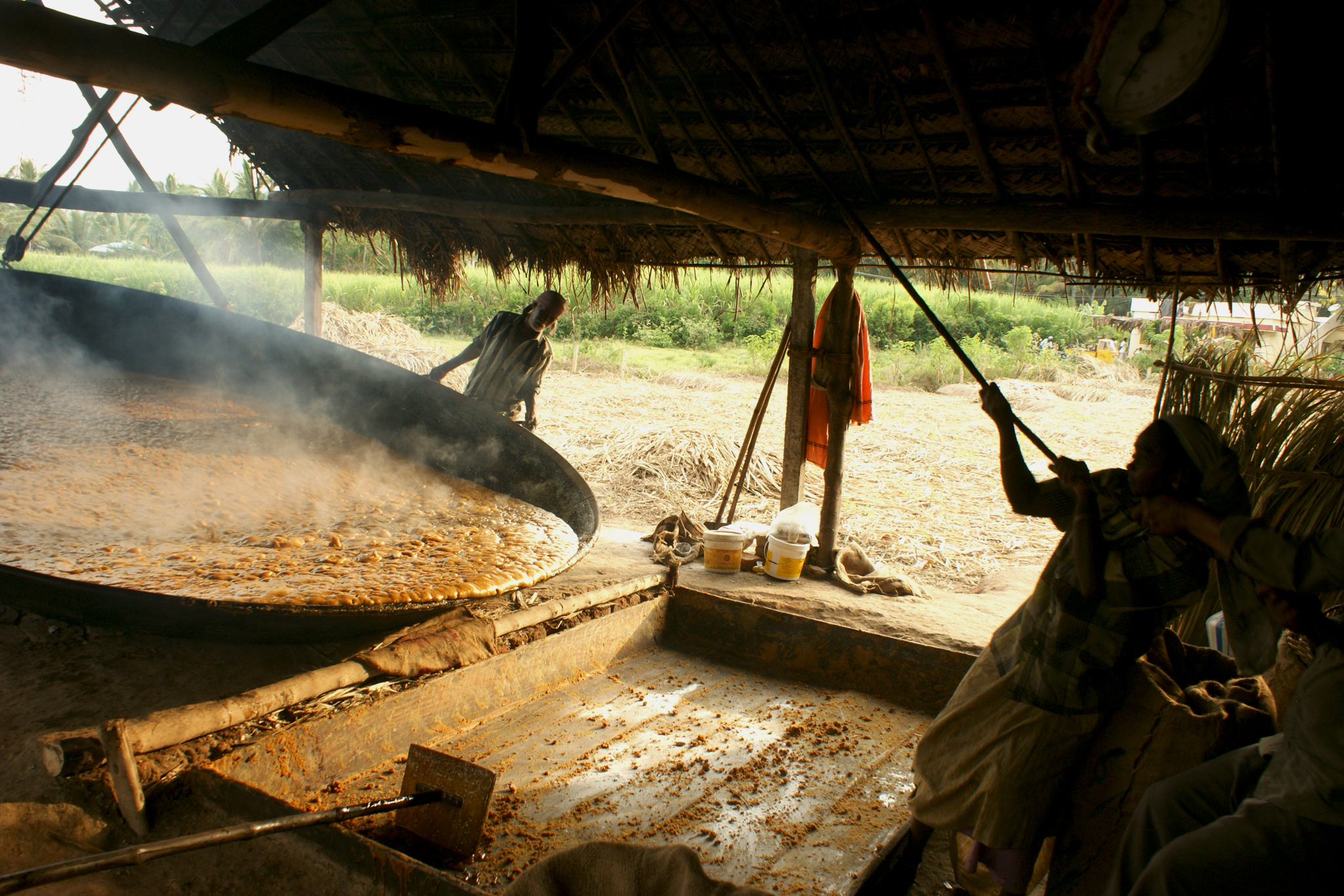 Jaggery preparation at Marayur, Kerala.